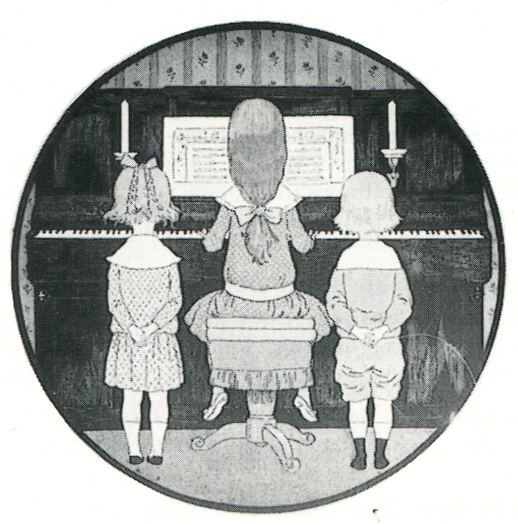 Lithographie aus einem Liederbuch für Kinder Am Klavier